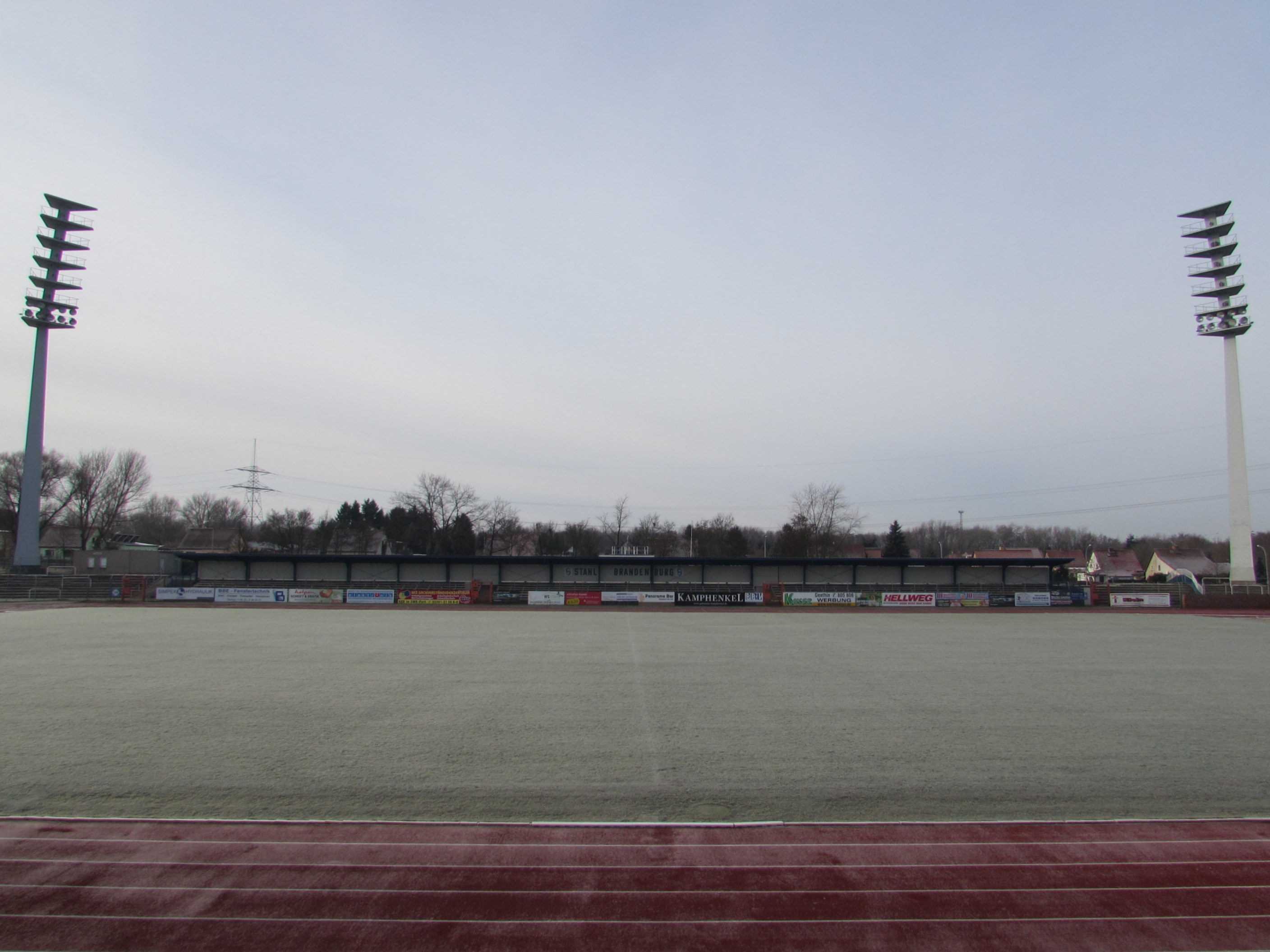 stahlstadion brandenburg, gegentribüne